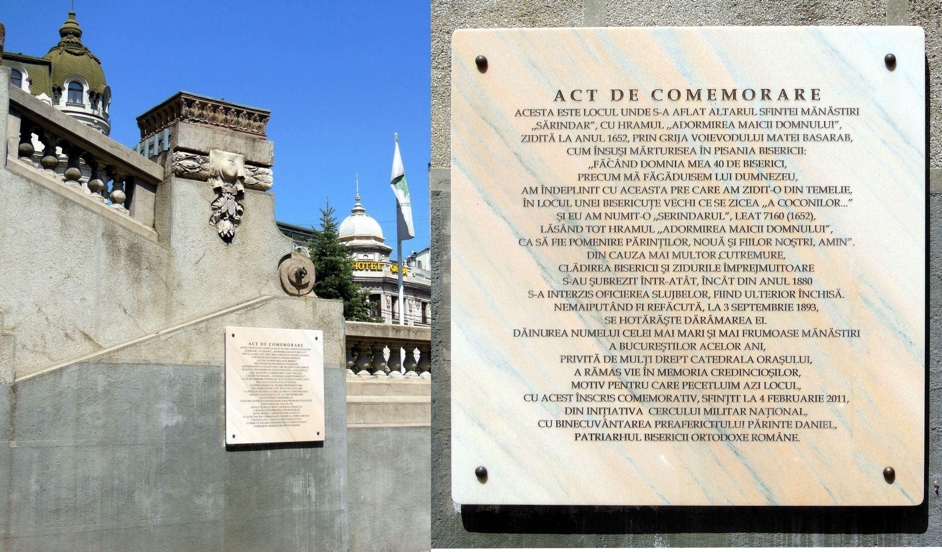 Placa comemorativă montată pe zidul exterior al scărilor ce urcă spre terasa din fața Palatului Cercului Militar Național, spre amintirea mănăstirii fostei Mănăstiri Sărindar, pe al cărei fost amplasament se ridică în prezent Palatul Cercului Militar Național.